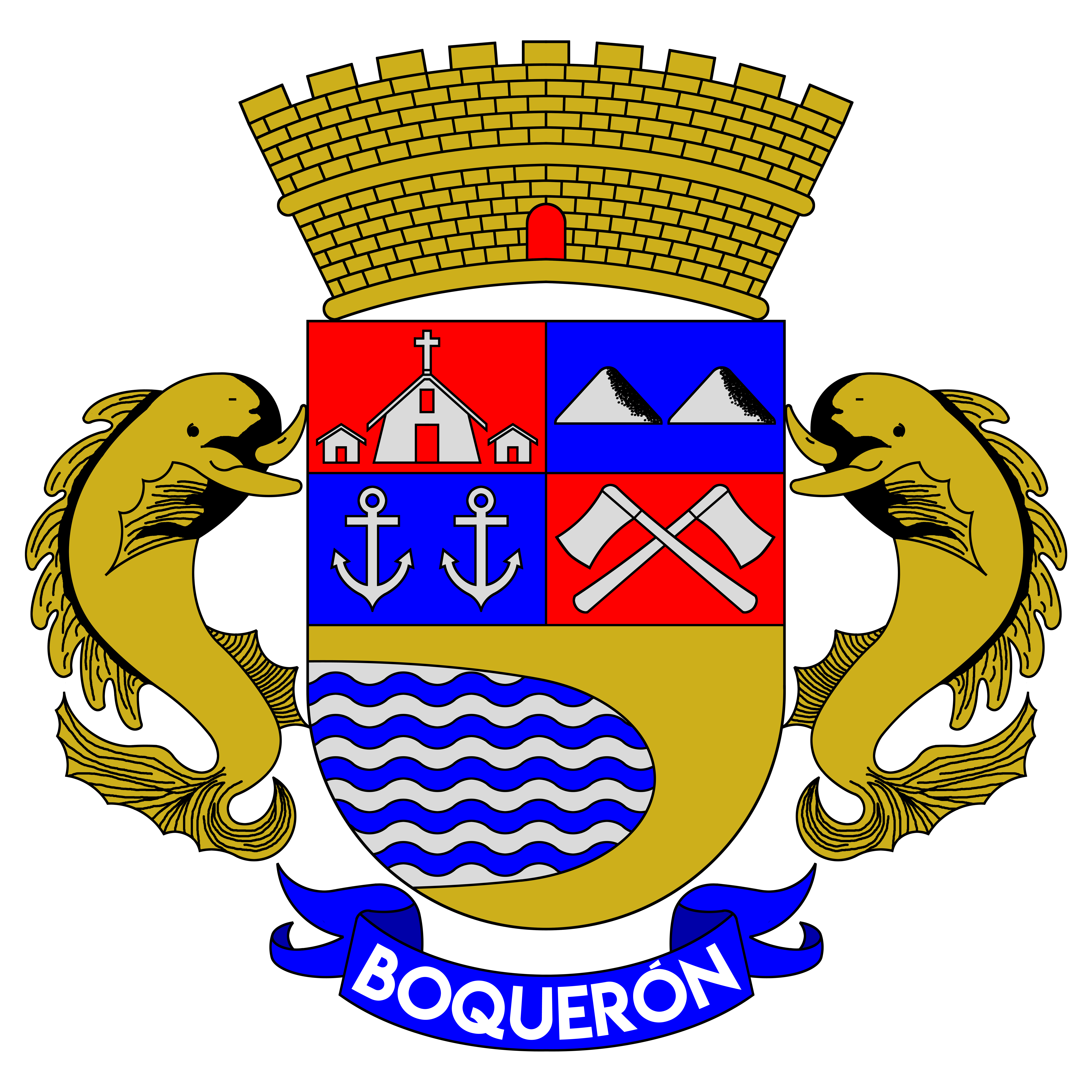 Escudo del Barrio Boquerón